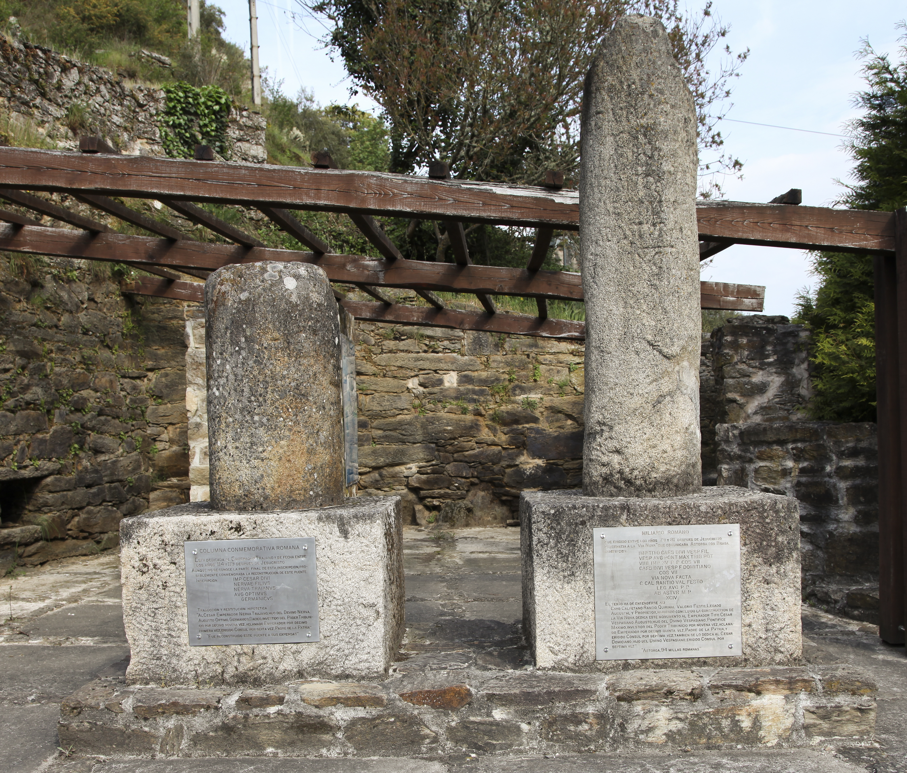 Miliario e columna conmemorativa romana. Máis información nas fotos das placas indicativas.